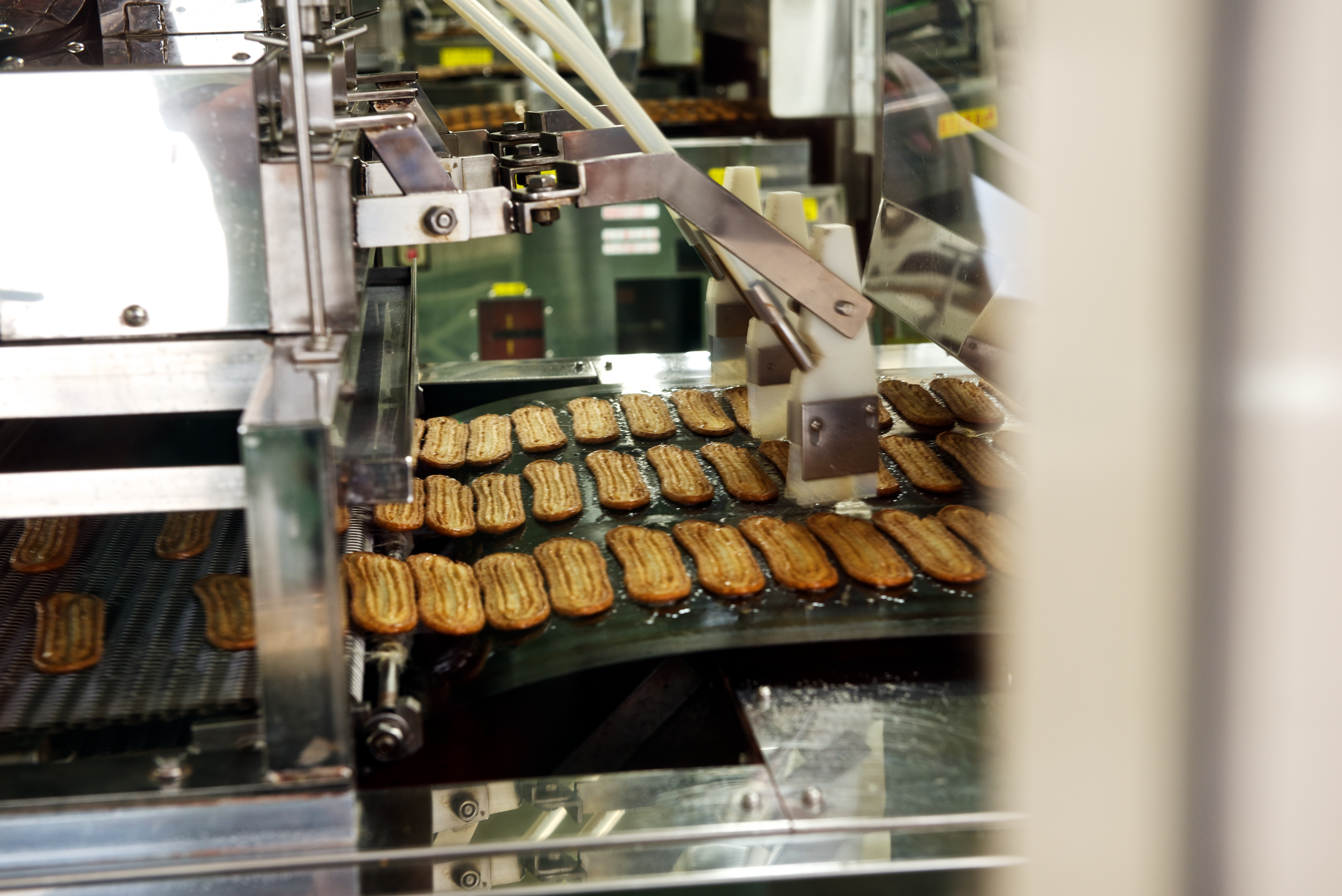 静岡県浜松市西区にある、うなぎパイファクトリー